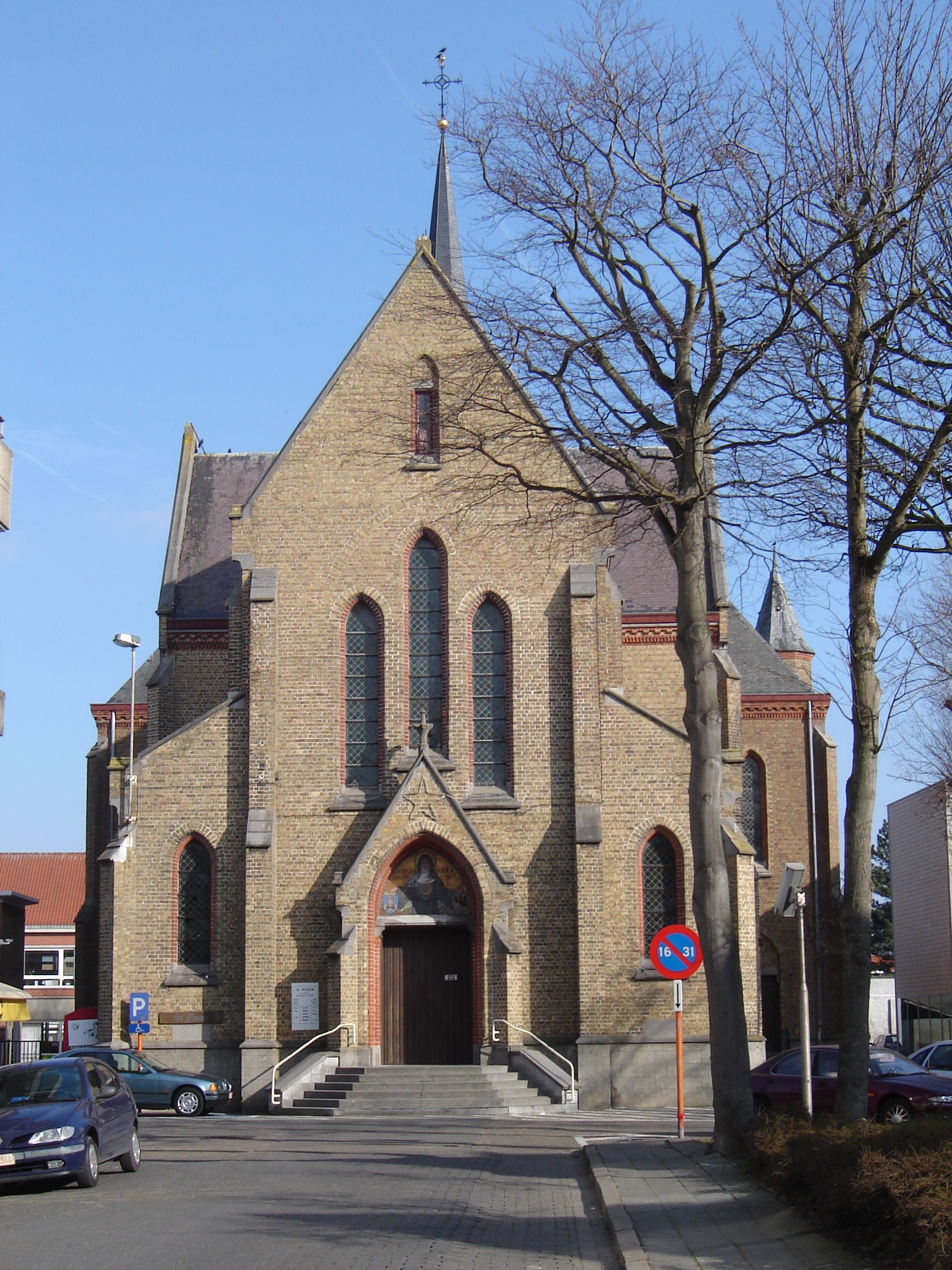 Sint-Monicakerk in De HaanChurch of Saint Monica in De Haan. De Haan, West Flanders, Belgium